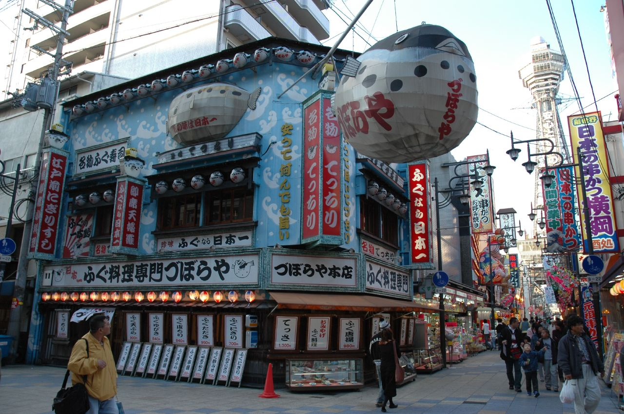 Pallokalaravintola Osakassa.DSC_0576